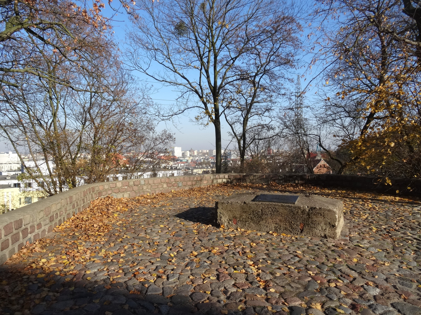 Skwer i tablica w parku im. Henryka Dąbrowskiego w Bydgoszczy upamiętniająca wydarzenia z 18 listopada 1956 roku, kiedy mieszkańcy spalili maszt radiostacji zagłuszającej audycje radia Wolna Europa